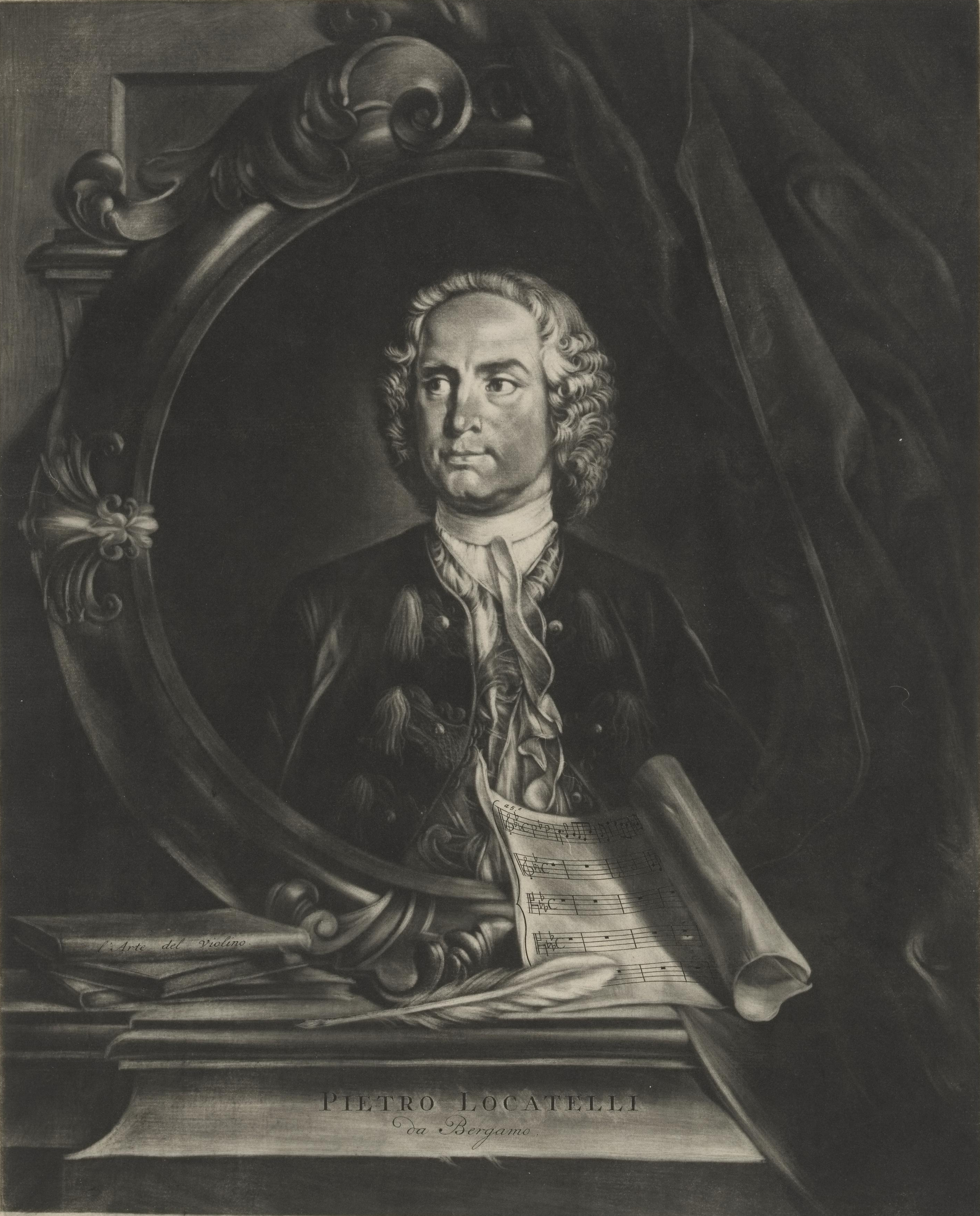 Depicted person: Pietro Antonio Locatelli